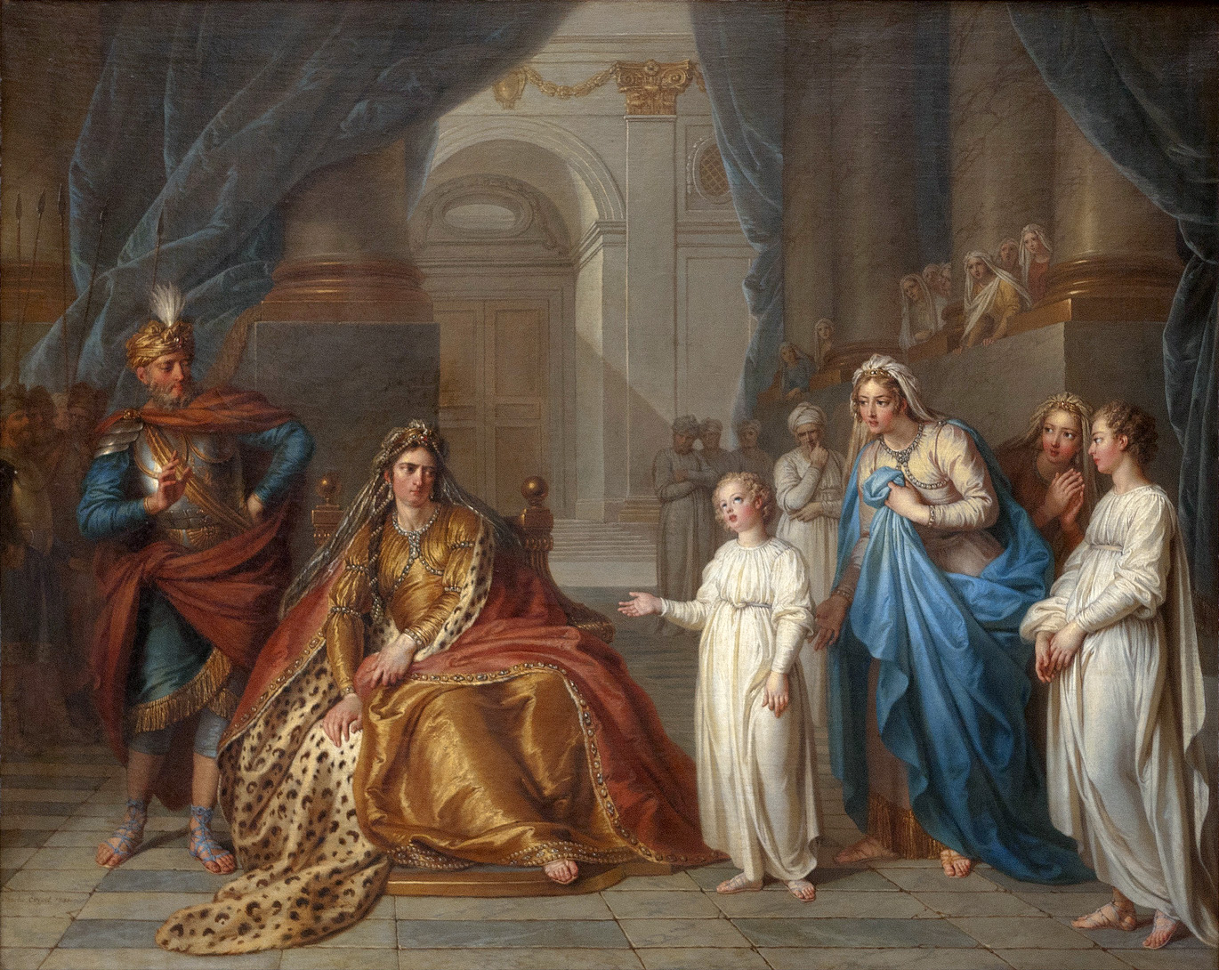 Cette œuvre se présente au spectateur comme une scène de théâtre. Le dépouillement du décor, encadré par de lourds rideaux, met en avant le face à face entre les deux personnages principaux : Athalie, la reine cruelle qui a usurpé le trône, et Joas, l’enfant innocent qui est en fait l’héritier légitime du royaume. L’expression des sentiments est particulièrement soulignée à travers la gestuelle et la position des personnages. Présentée au Salon de 1741, ce tableau rencontre un vif succès : le roi Louis XV en commande une copie au peintre (aujourd’hui conservée au musée des beaux-arts de Niort), puis la composition est reprise sous la forme d’une tapisserie par la Manufacture des Gobelins.